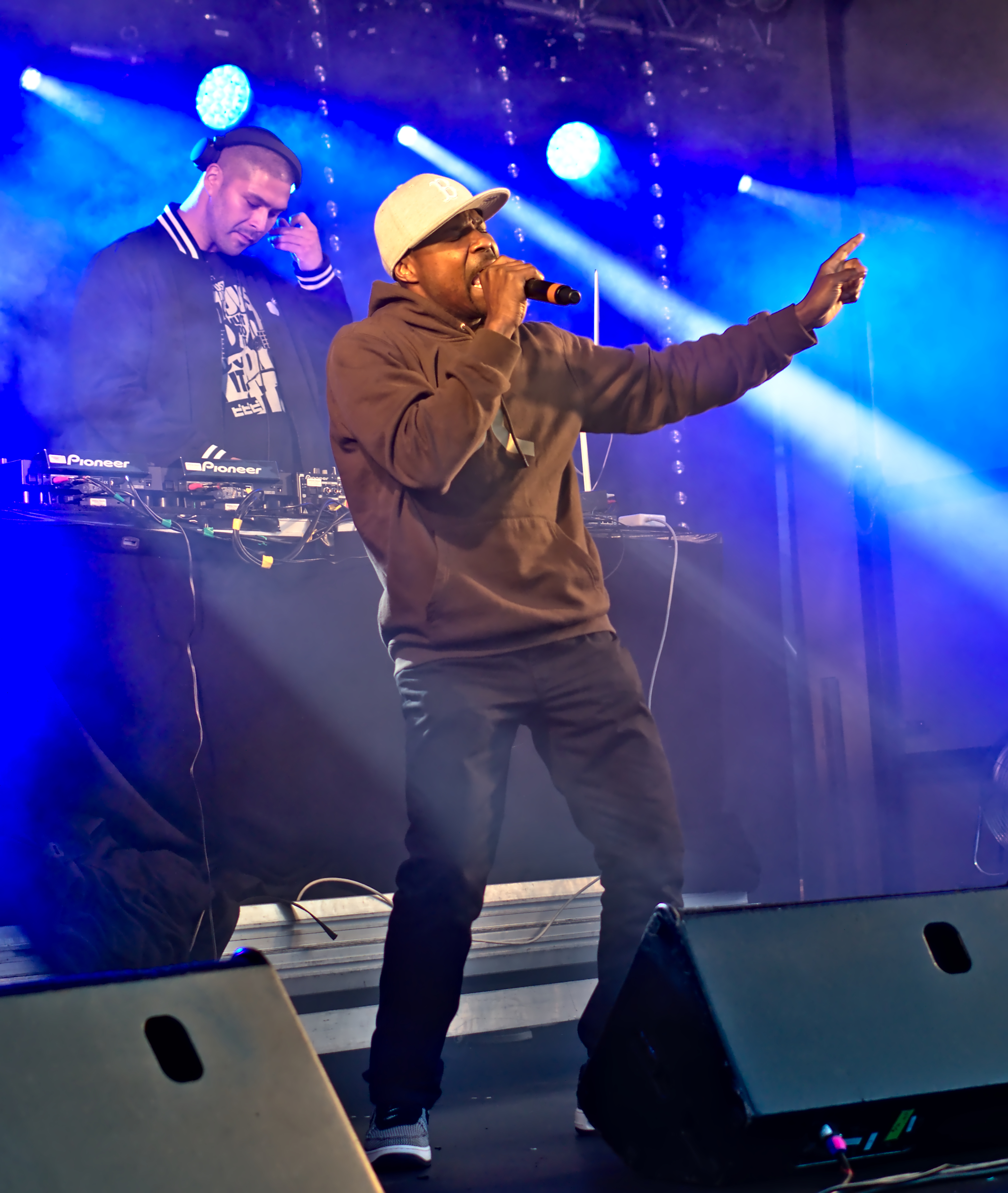 Bamma B uppträder tillsammans med The Salazar Brothers på Fristadstorget i Eskilstuna.